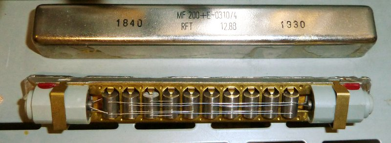 Filterbaustein mit der Bezeichnung MF 200 + E Bauart: mechanisches Filter mit Torsions-Resonatoren für eine Trägerfrequenzanlage.